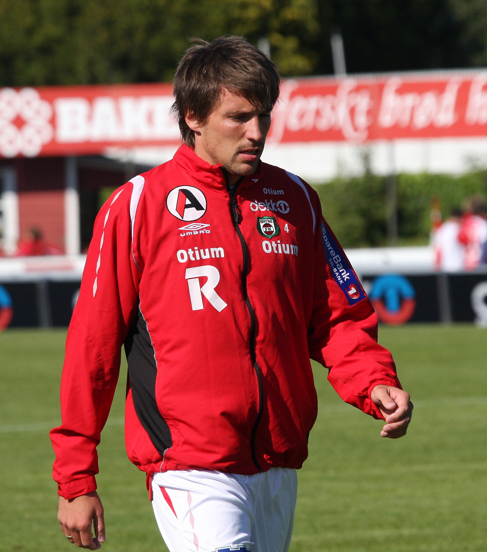 Vegar Landro at Bryne stadion